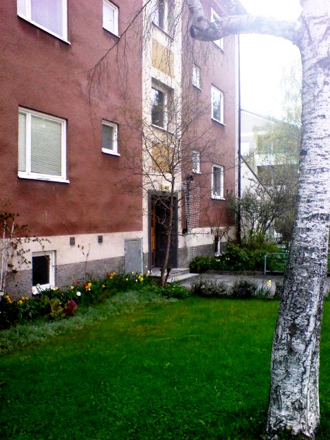 Bergsrådsvägen, Bagarmossen. Stockholm.